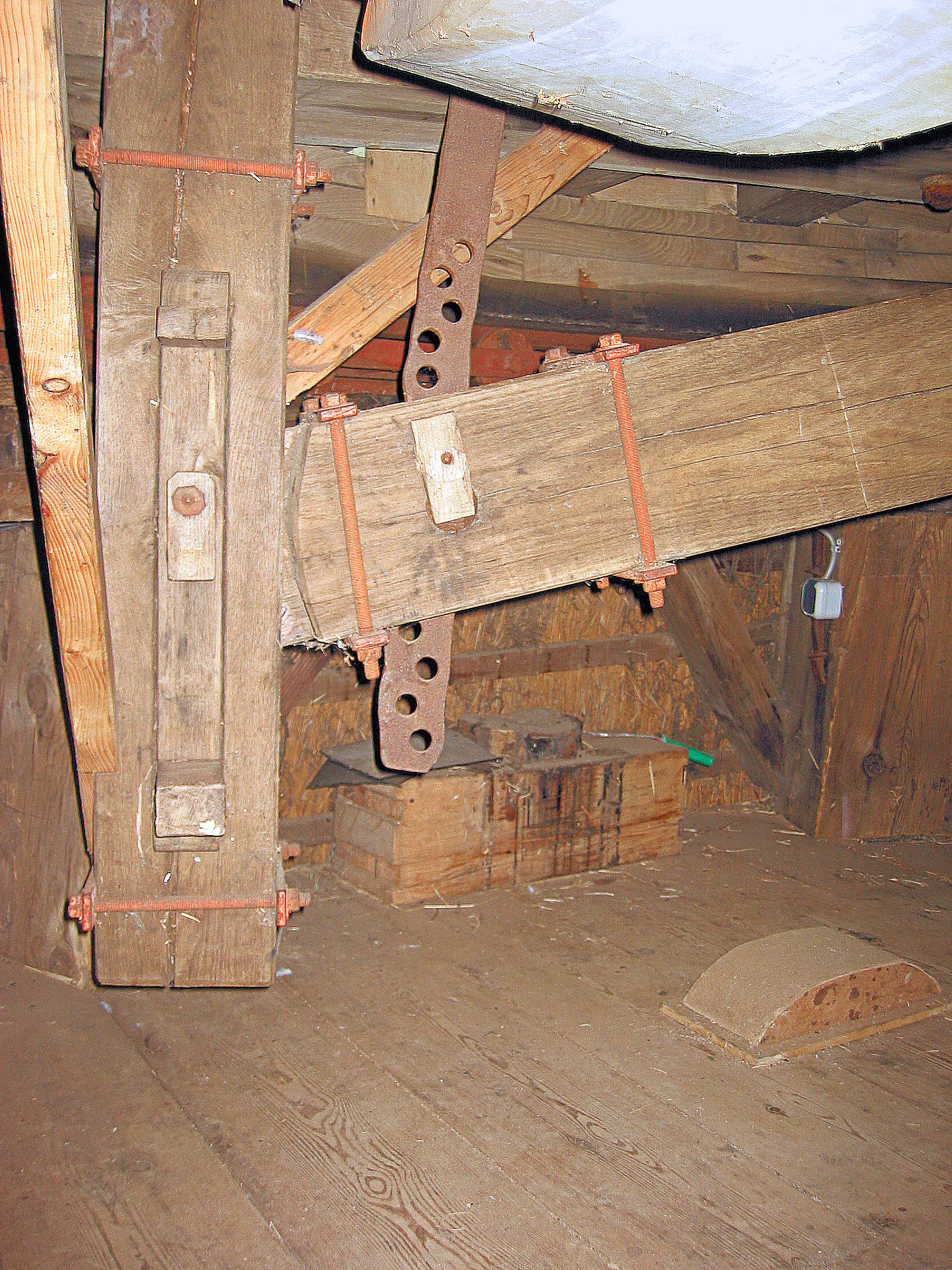 Ezel Walderveensemolen in Walderveen, Gelderland, the Netherlands